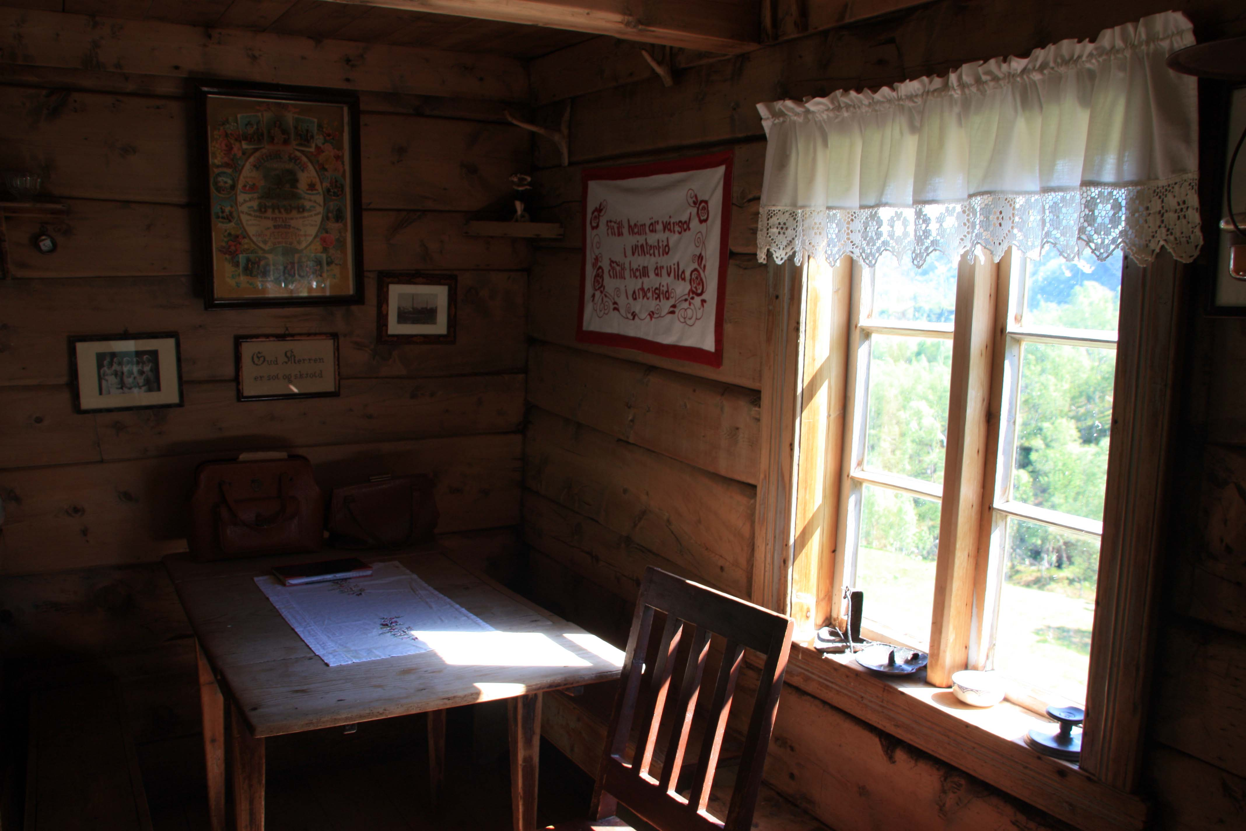 Interiør fra våningshuset på Husmannsplassen Kjelvik.